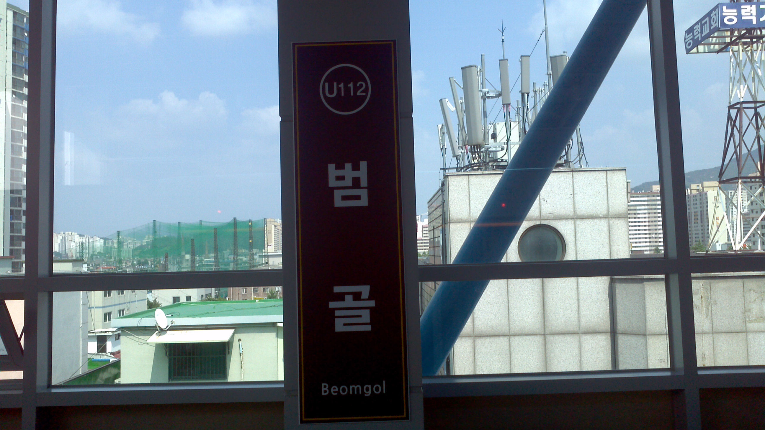 범골역 역명판